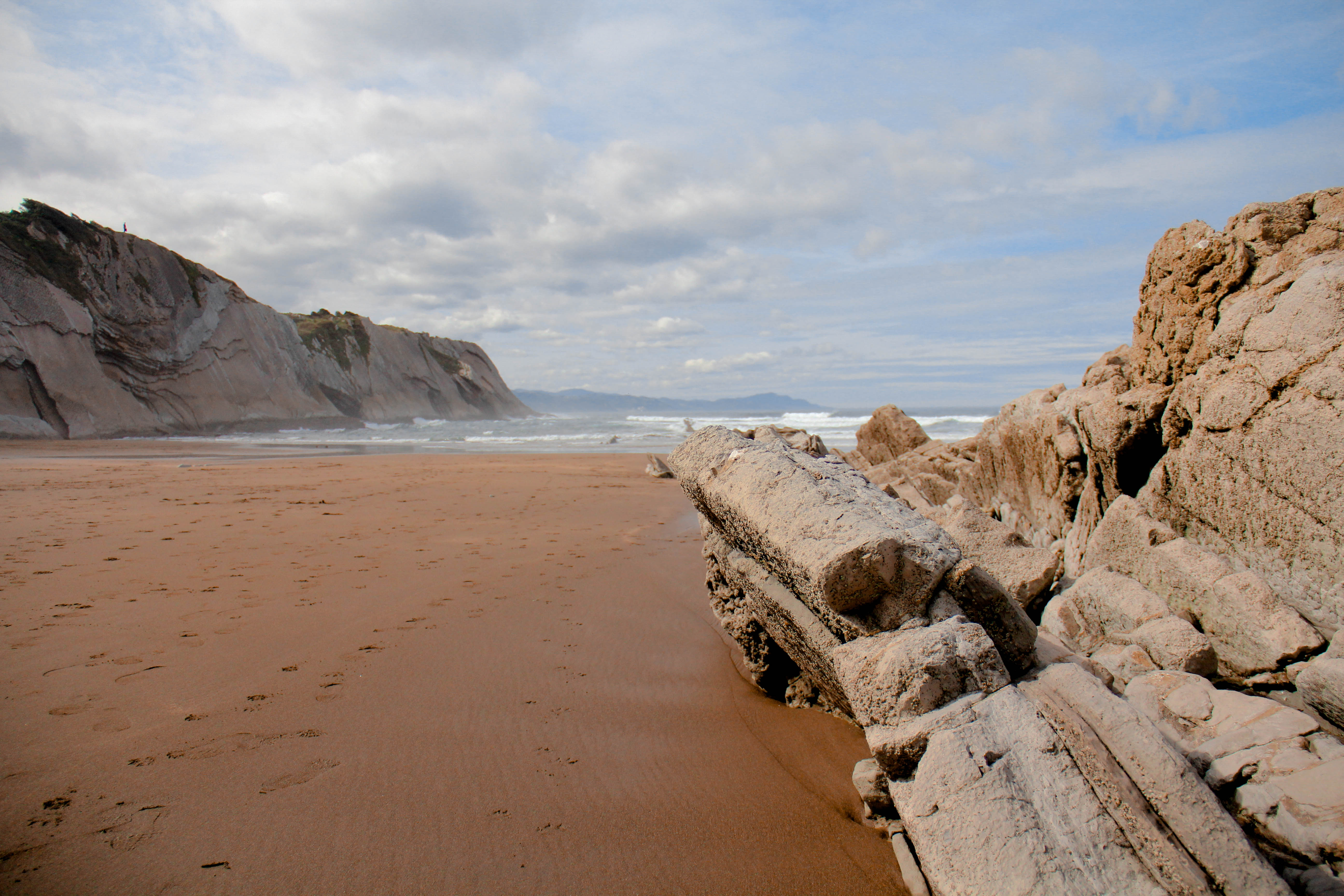 Zumaiako Itzurungo hondartza